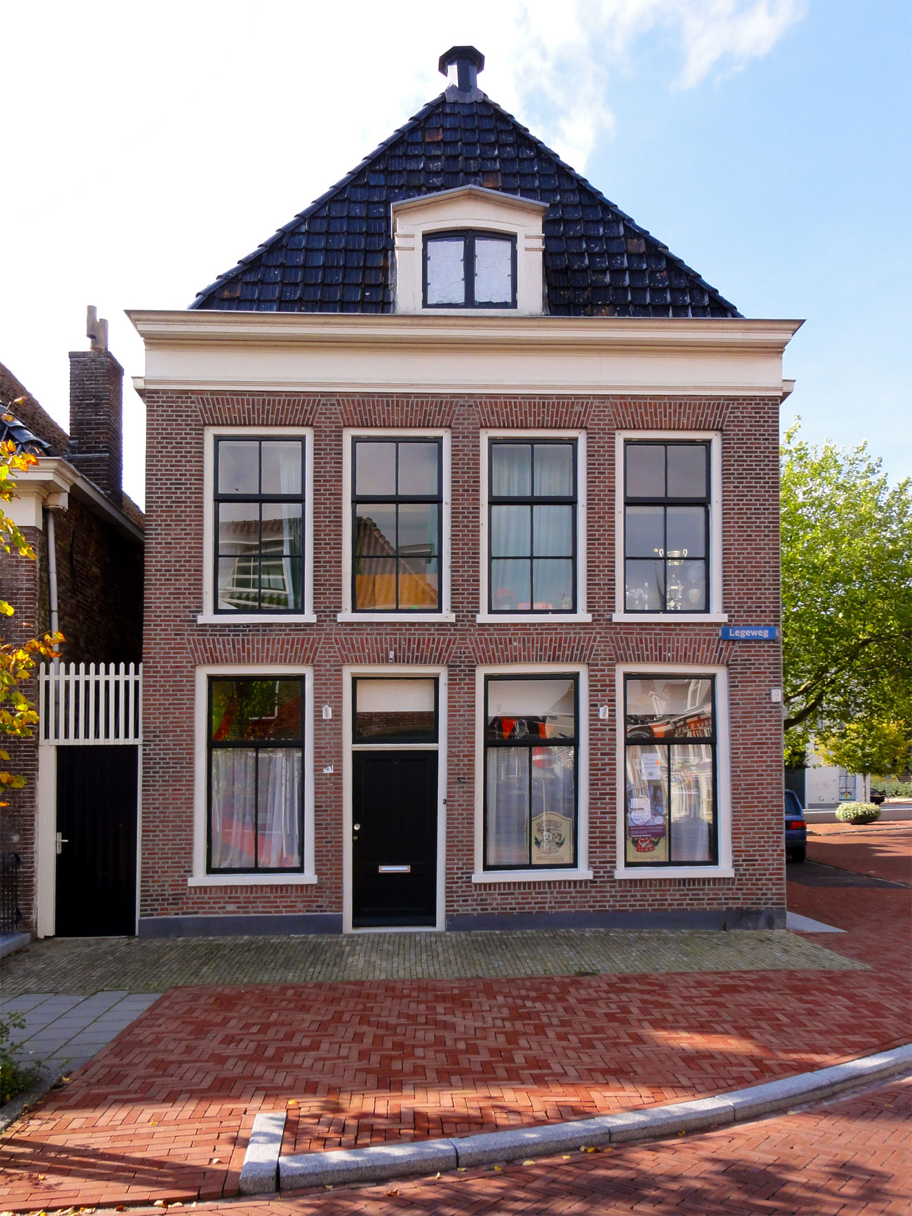 Legeweg 41 Dokkum, rijksmonument